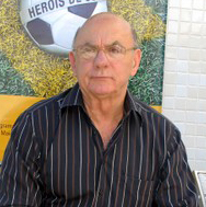 O ex-jogador Dino Sani, durante as comemorações dos 50 anos da conquista do primeiro título mundial de futebol pelo Brasil.